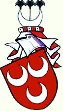 Erb Bírků z Násile